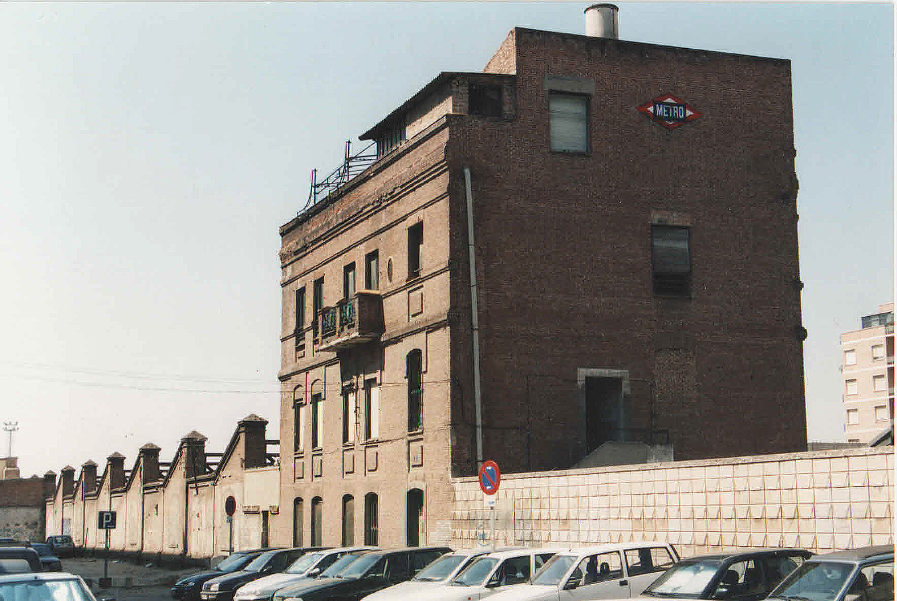 Peluqueria Metro